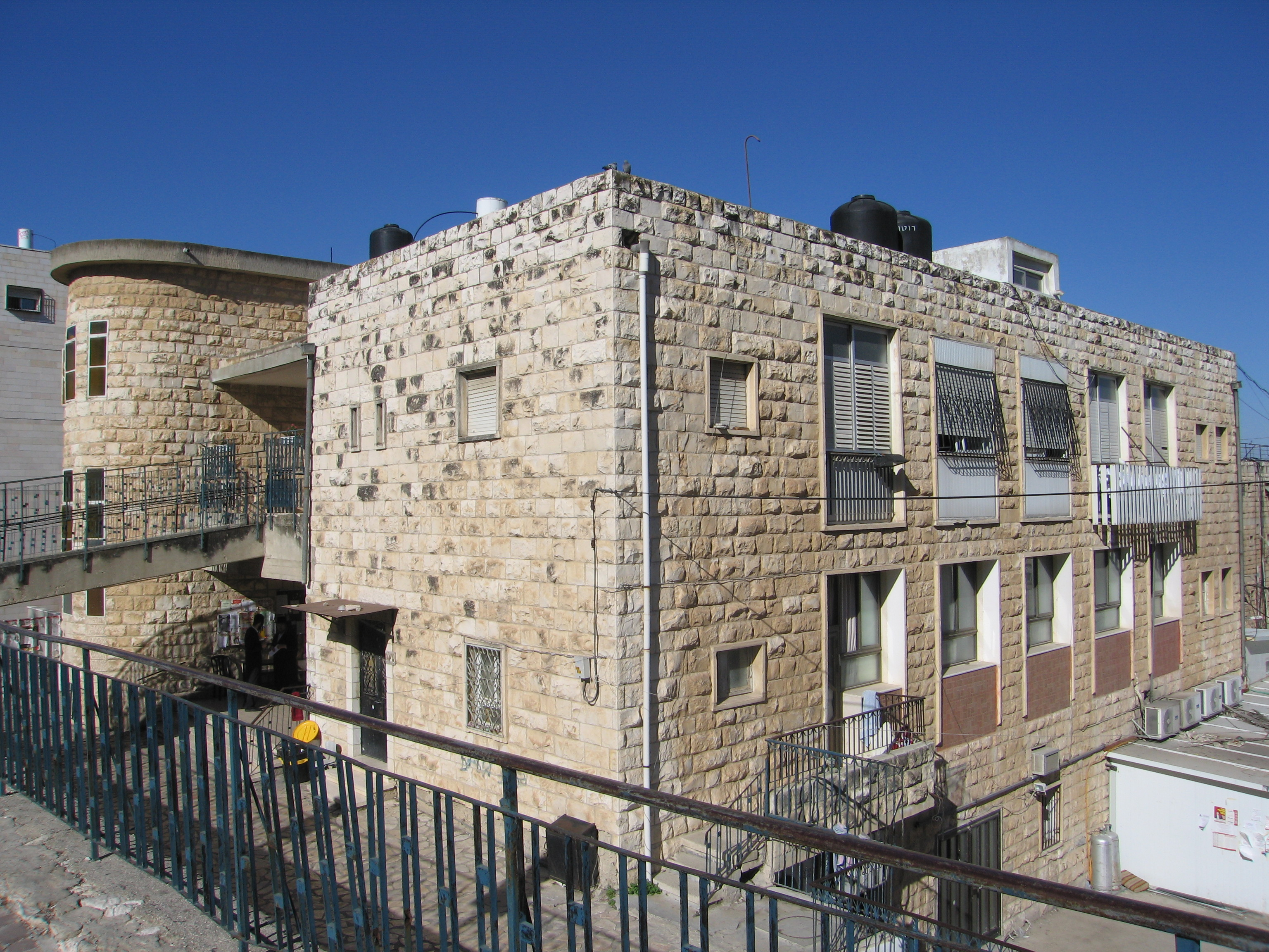 בית מדרש המרכזי של חסידות צאנז, קריית צאנז, ירושלים